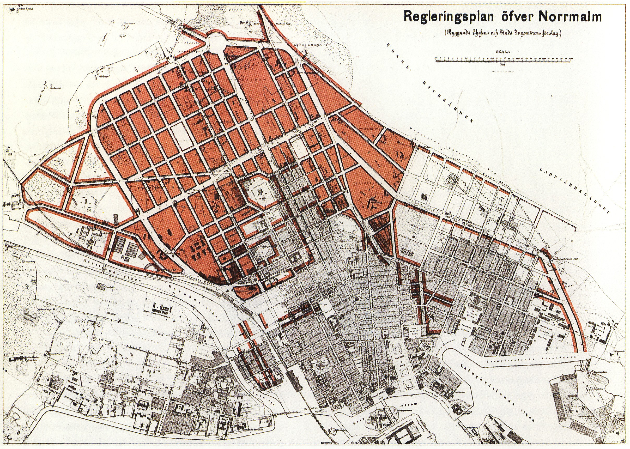 Regleringsplan för Norrmalm, Stockholm 1876